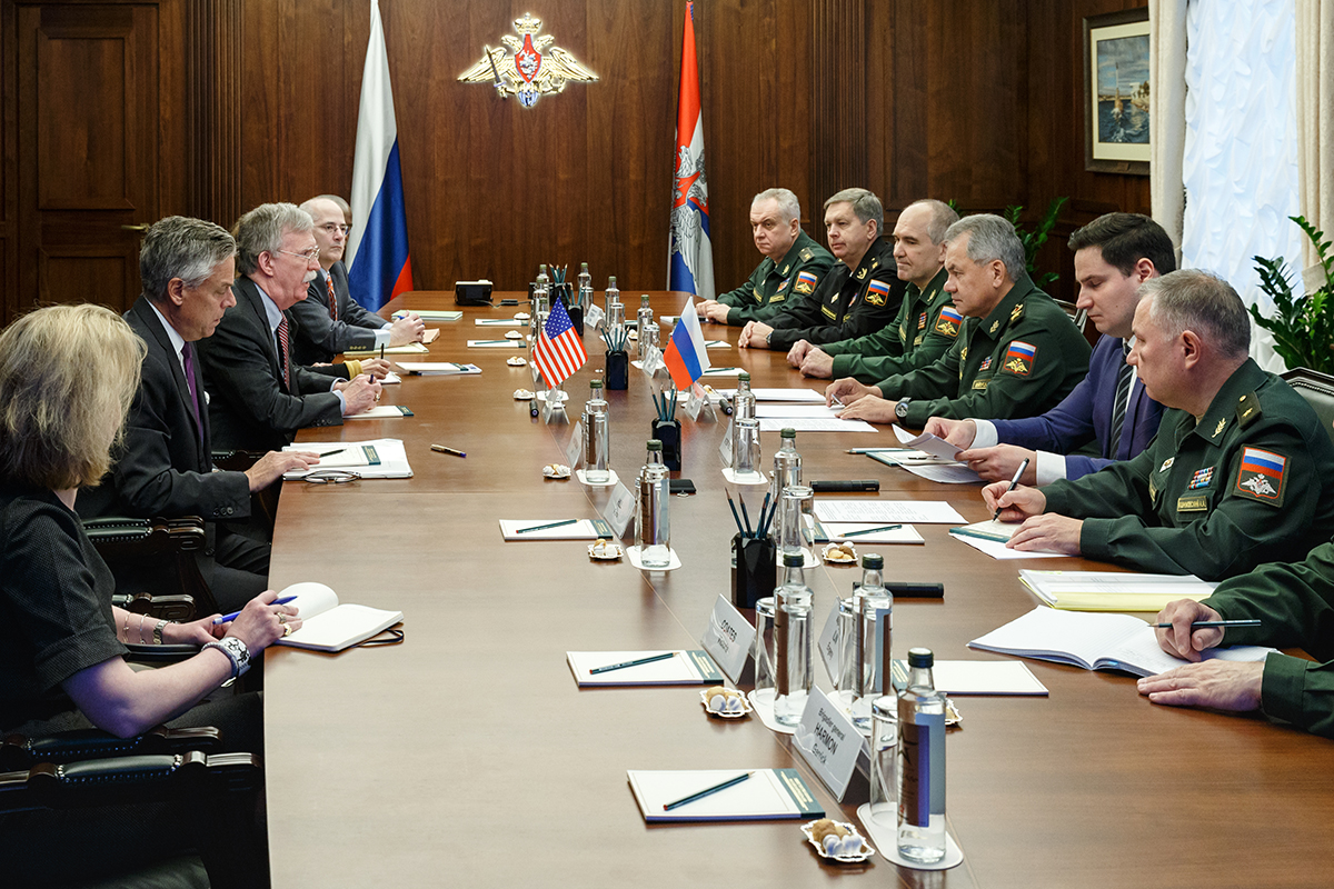 Переговоры министра обороны России генерала армии Сергея Шойгу и советника президента США по национальной безопасности Джона Болтона.